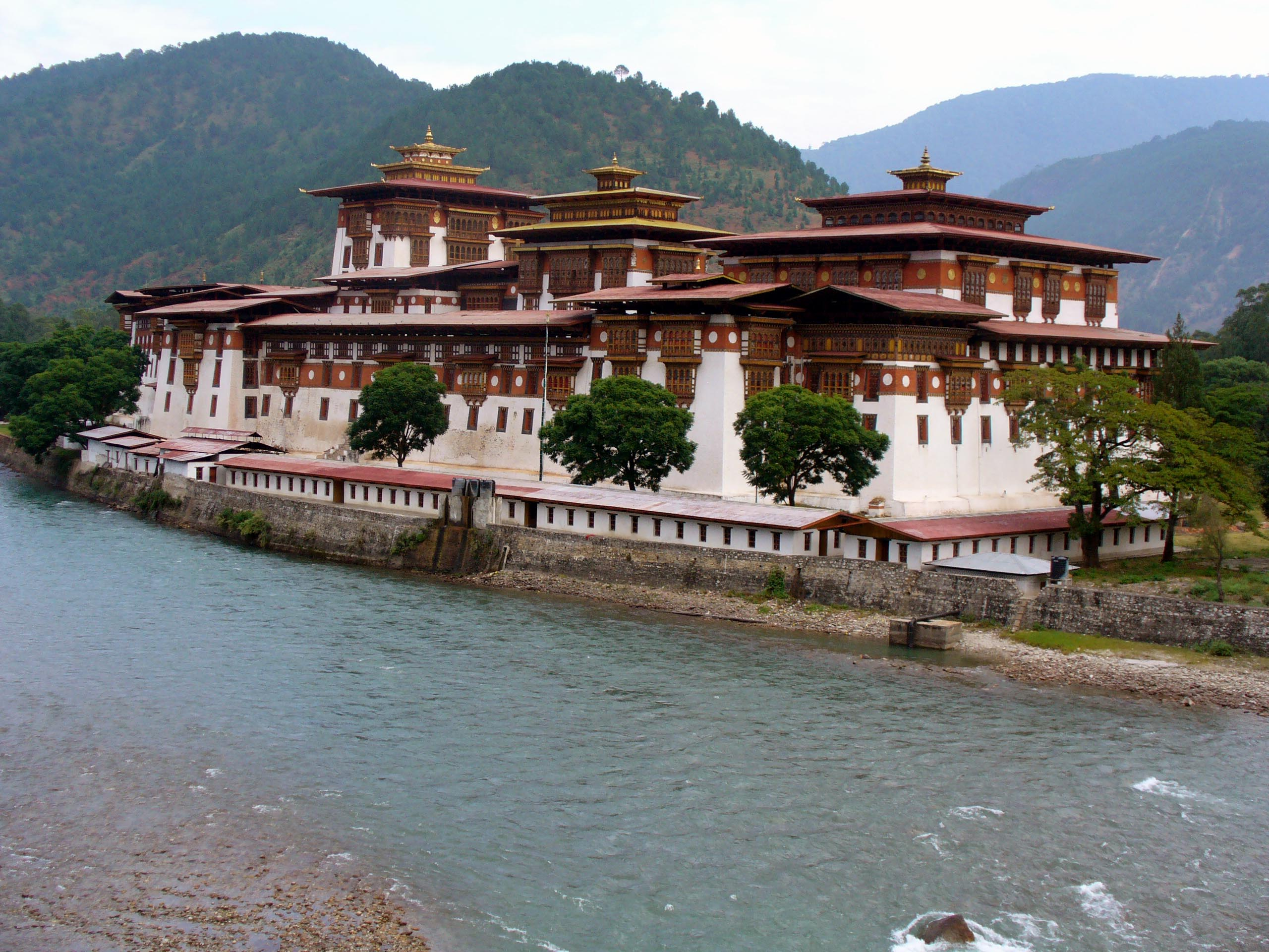 Dzong in Punakha